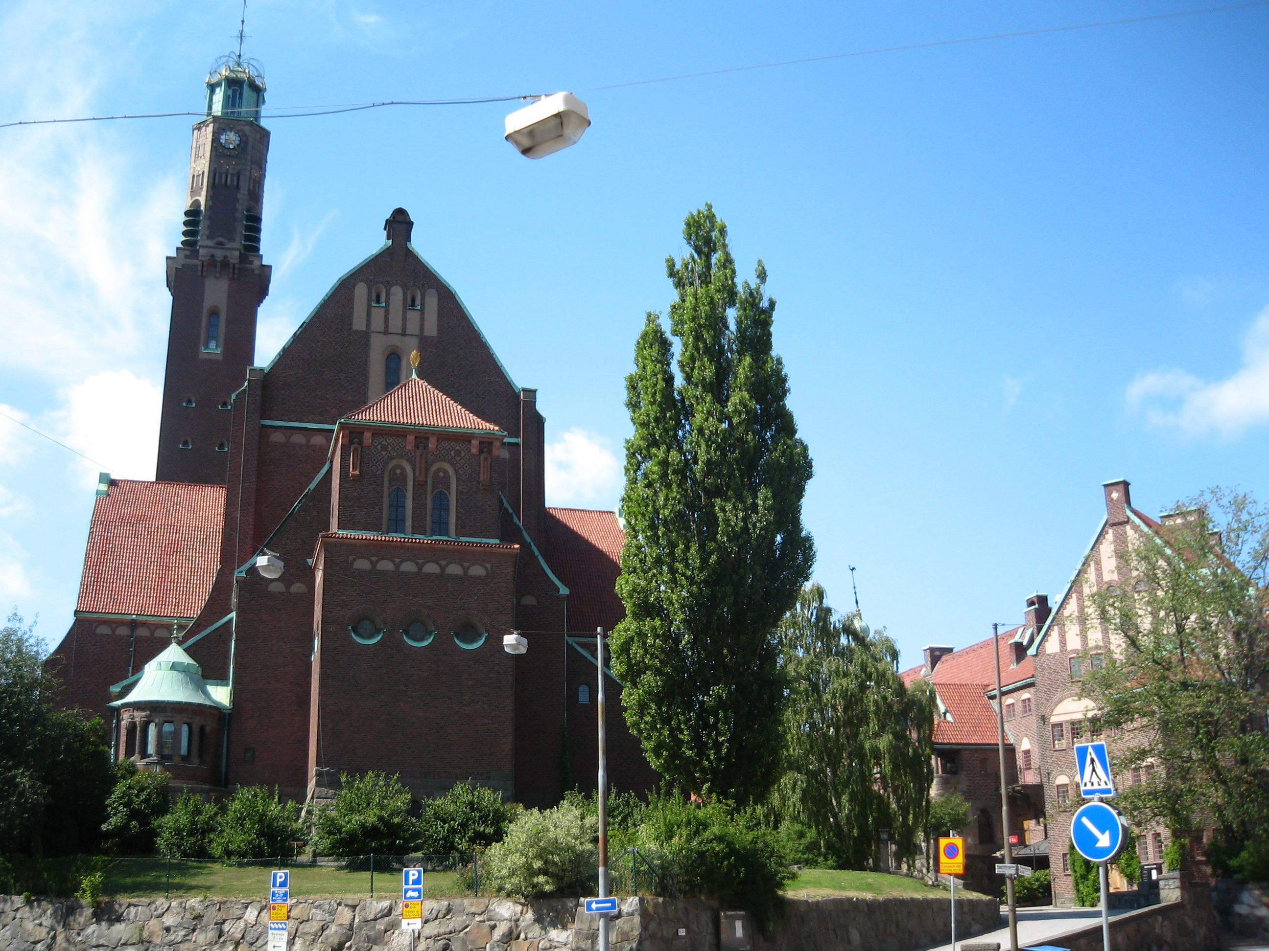 Lärkstaden, Stockholm